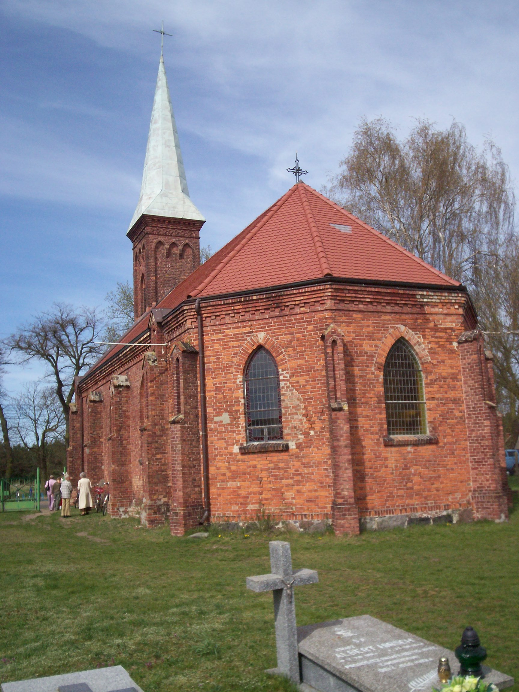 Widok na kościół w Borzysławcu